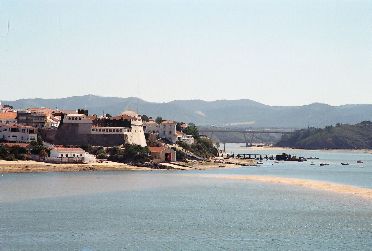 Foz do rio Mira